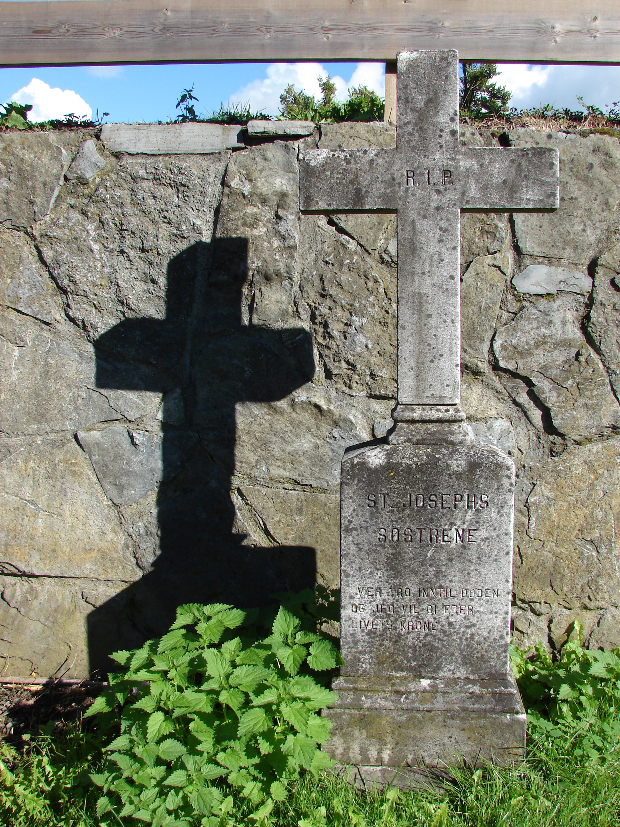 R.I.P., ST. JOSEPHS, SØSTRENE, VÆR TRO INNTIL DØDEN, OG JEG VIL GI EDER LIVETS KRONE, Østre Porsgrunn Kirkegård, Telemarken